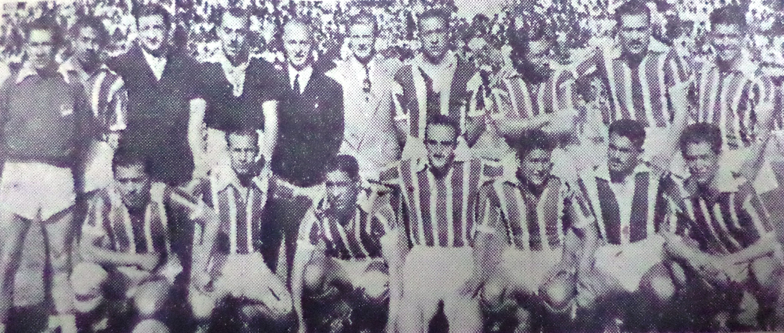 El equipo de Litoral que resultó subcampeon del Primer Campeonato Profesional de la La Paz Football Association 1950